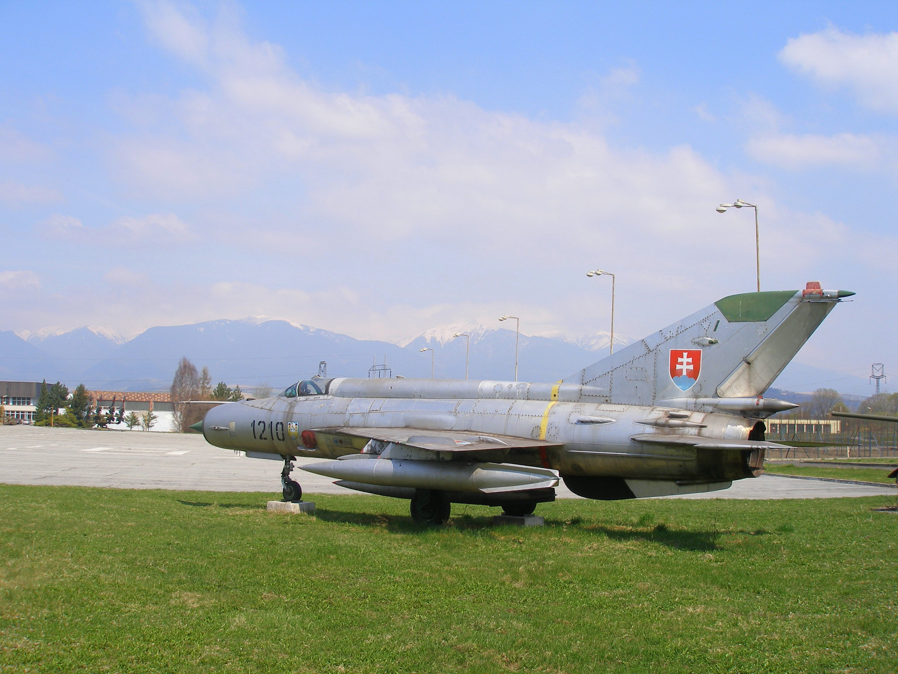 Akadémia ozbrojených síl generála Milana Rastislava Štefánika. Liptovský Mikuláš, Slovensko.